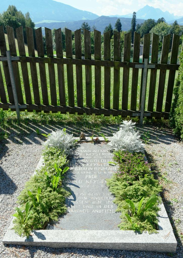 Grab des Philosophen Hermann Graf Keyserling (1880-1946) auf dem Neuen Friedhof Mühlau, Innsbruck